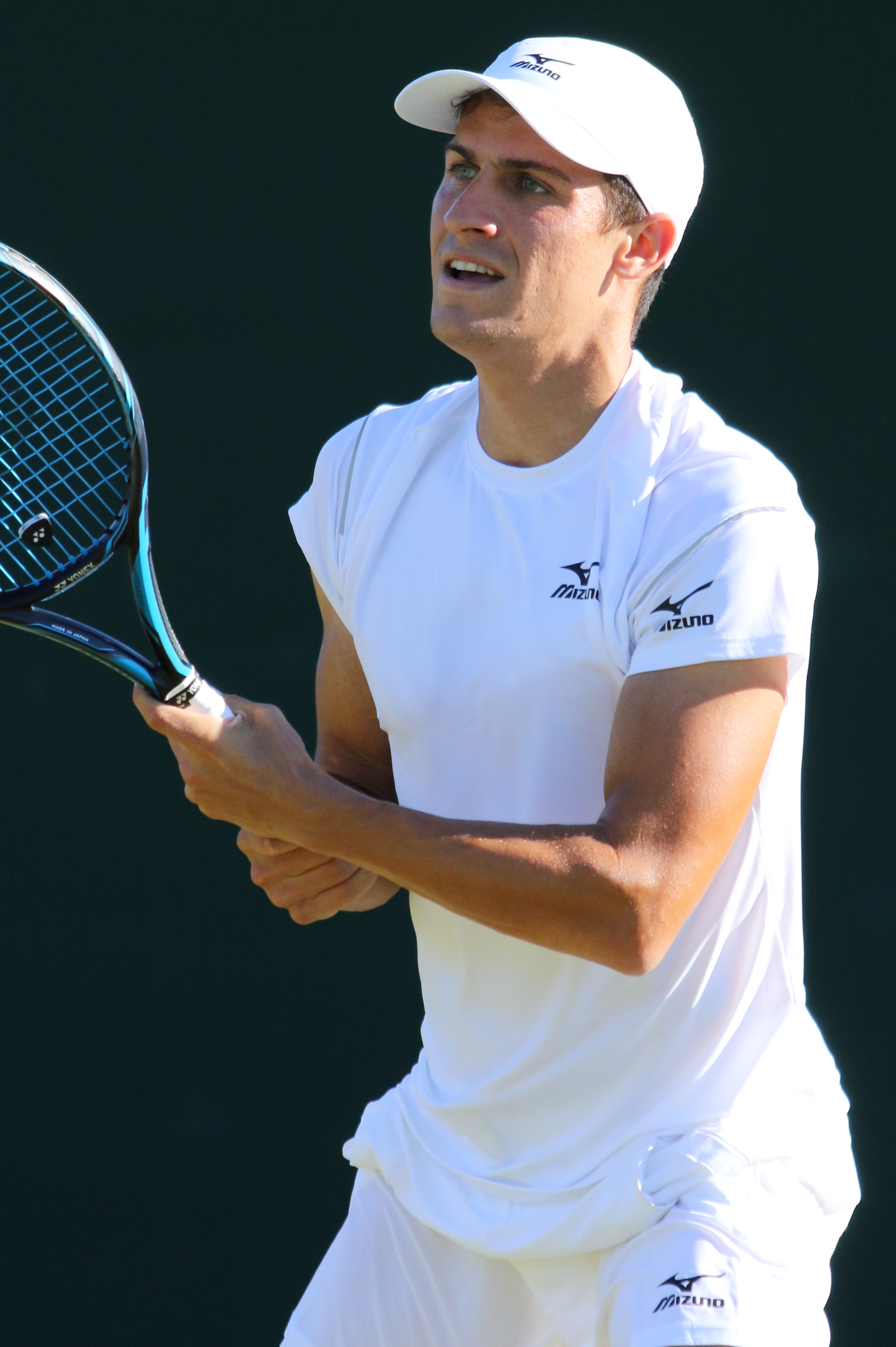 Balazs WMQ18 (29)